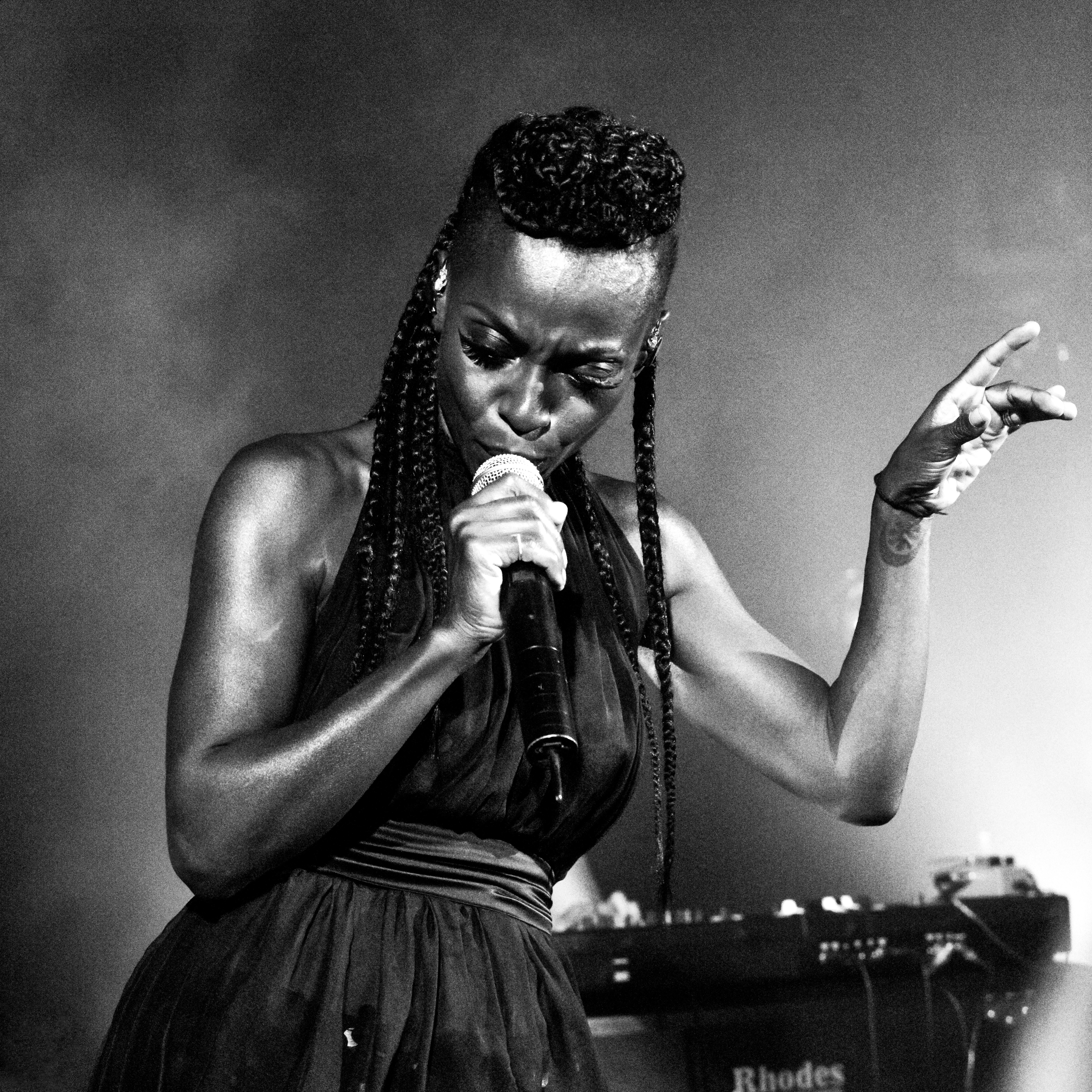 Bilder vom Zelt Musik Festival 2018 in Freiburg im Breisgau Morcheeba Auftritt am 31. Juli 2018 im Speigelzelt